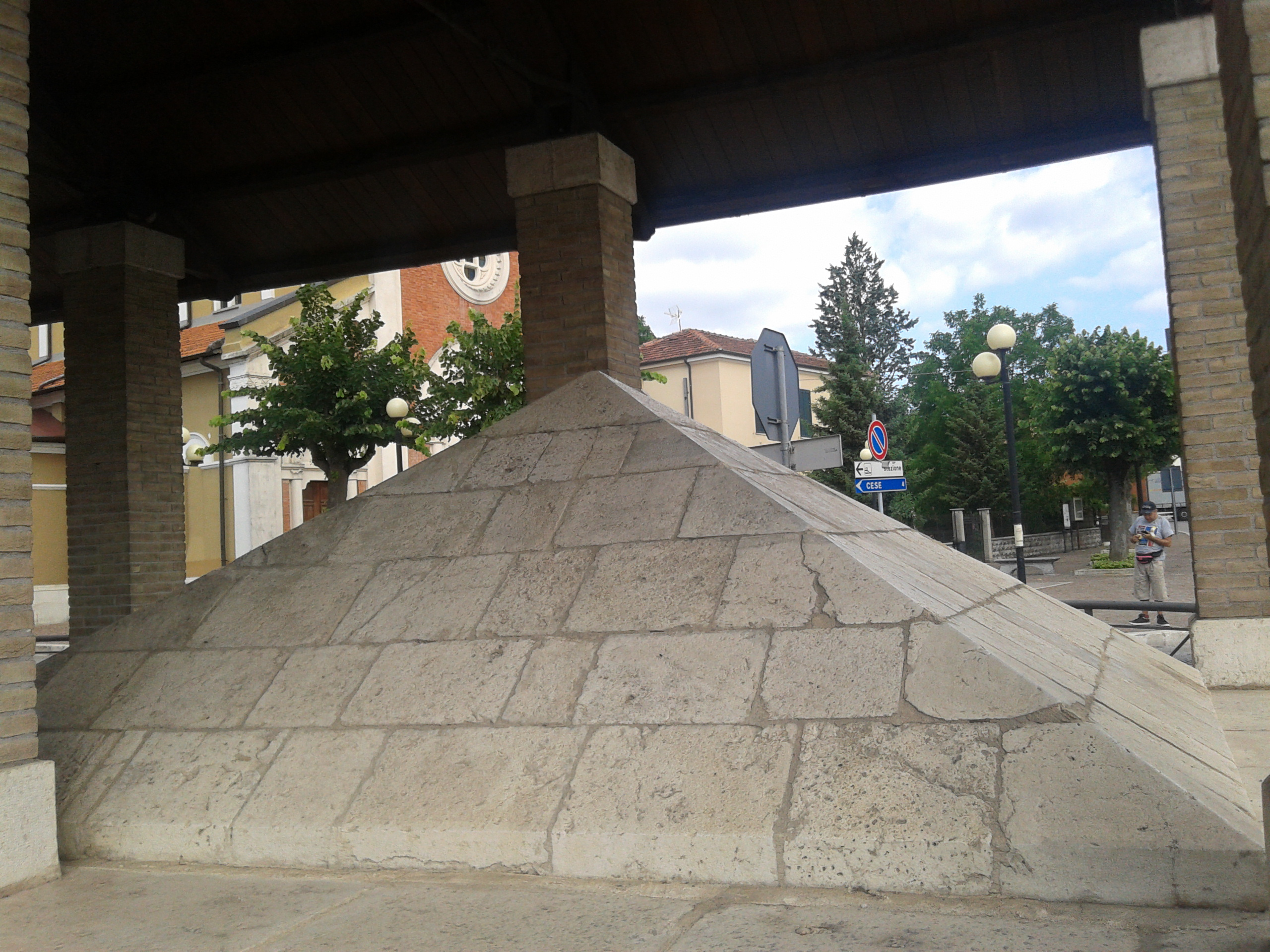 Lavatoio di Cappelle dei Marsi